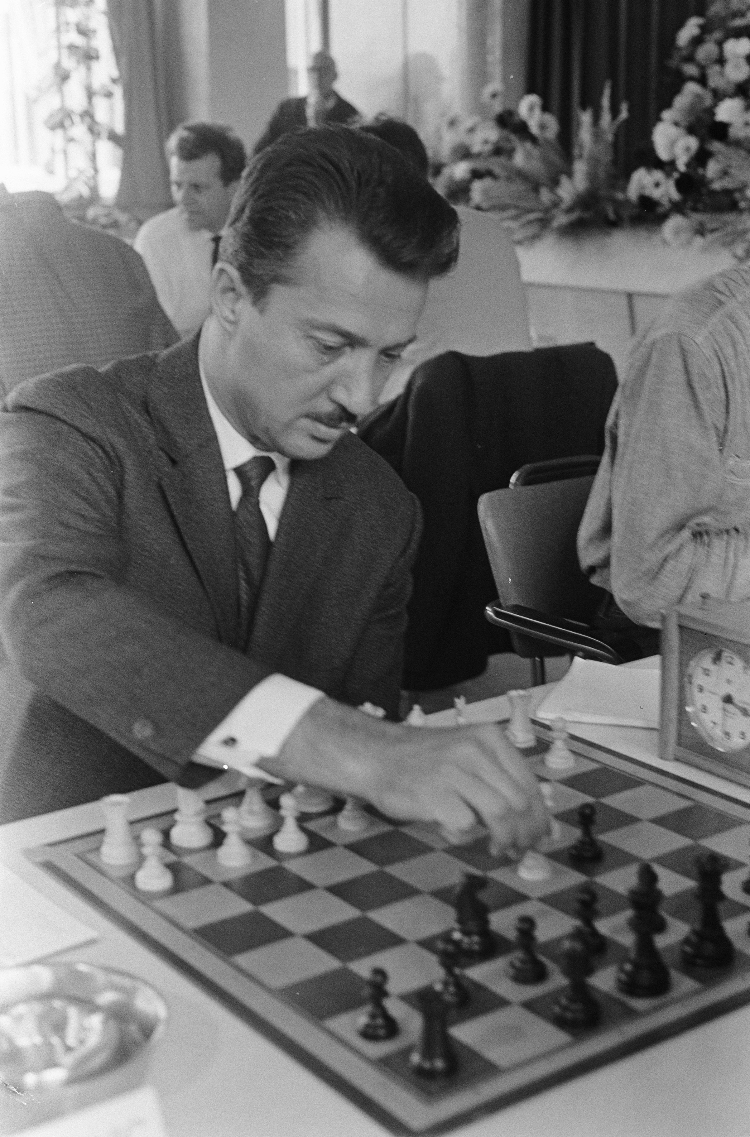 De Yoegoslavische Svetozar Gligoric aan het schaakbord. Fédération Internationale des Échecs (FIDE) -Zone schaaktoernooi 1966 in de kantine van 'De Nederlanden van 1845' te Den Haag